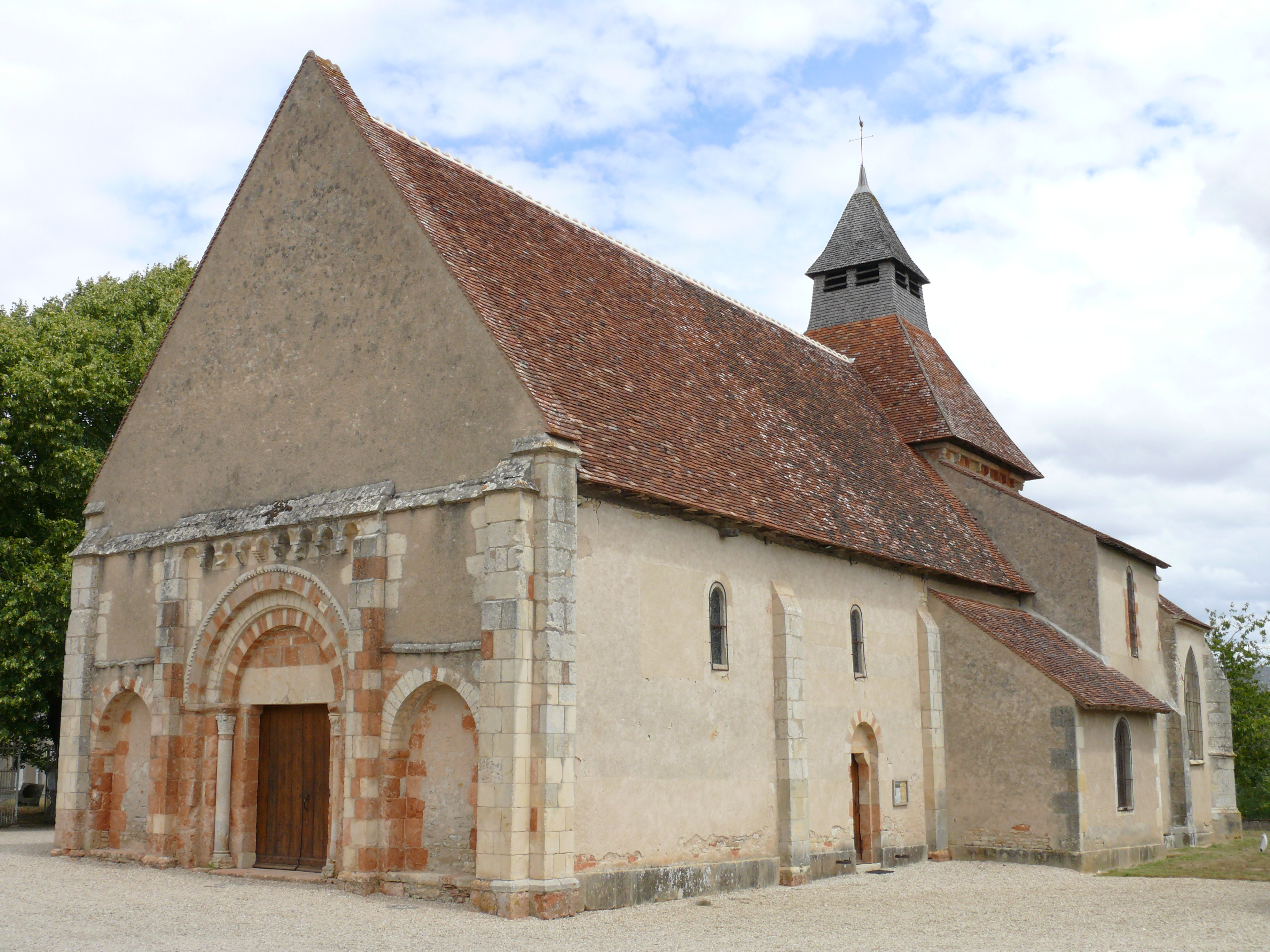 Osmery - Eglise Saint-Julien - Ensemble